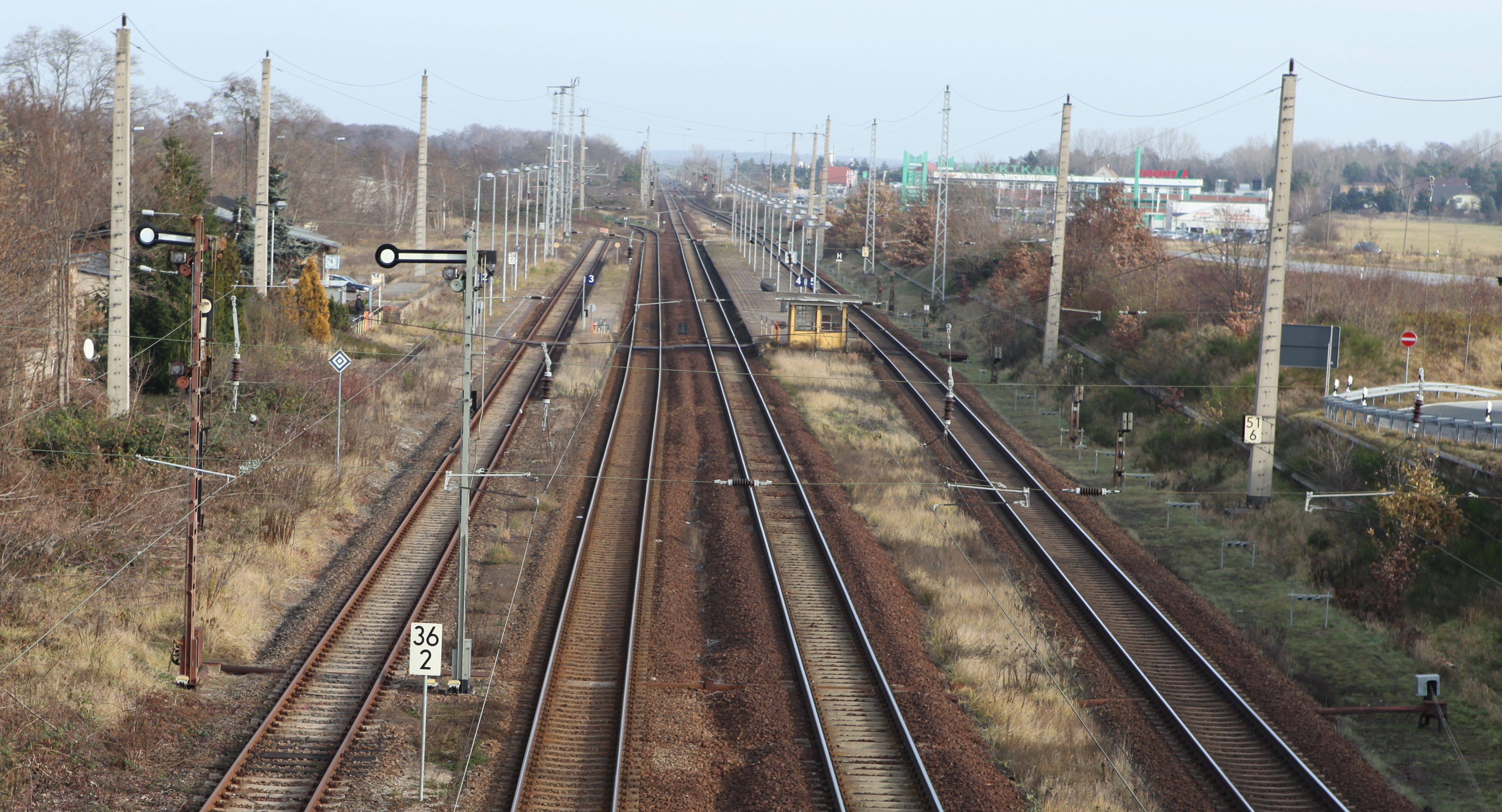 Bahnhof Eilenburg OstKamera: Canon Eos 5D Mark II mit Canon EF 24-70mm 1:2.8 L USM